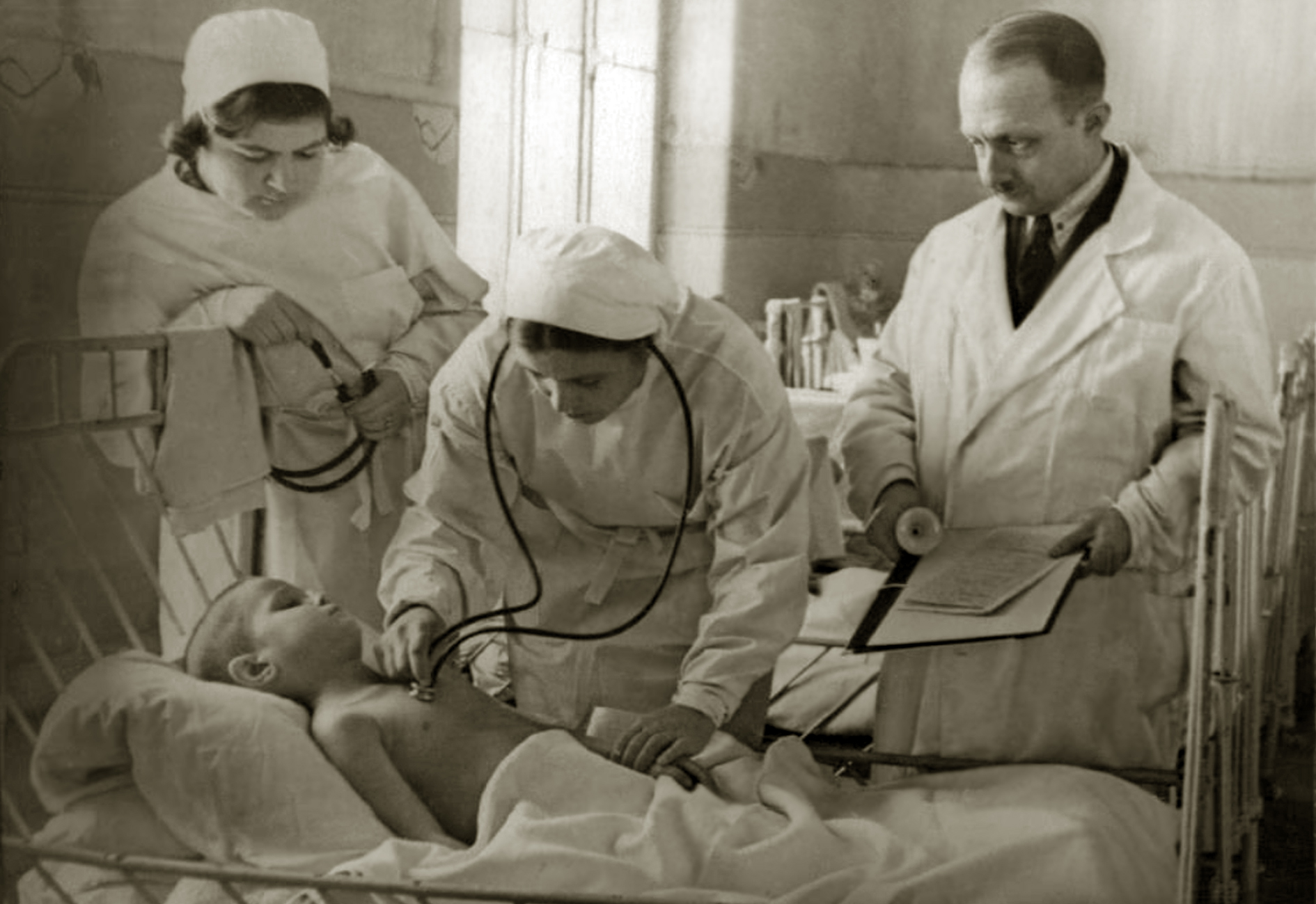 Профессорский обход в клинике ЛПМИ